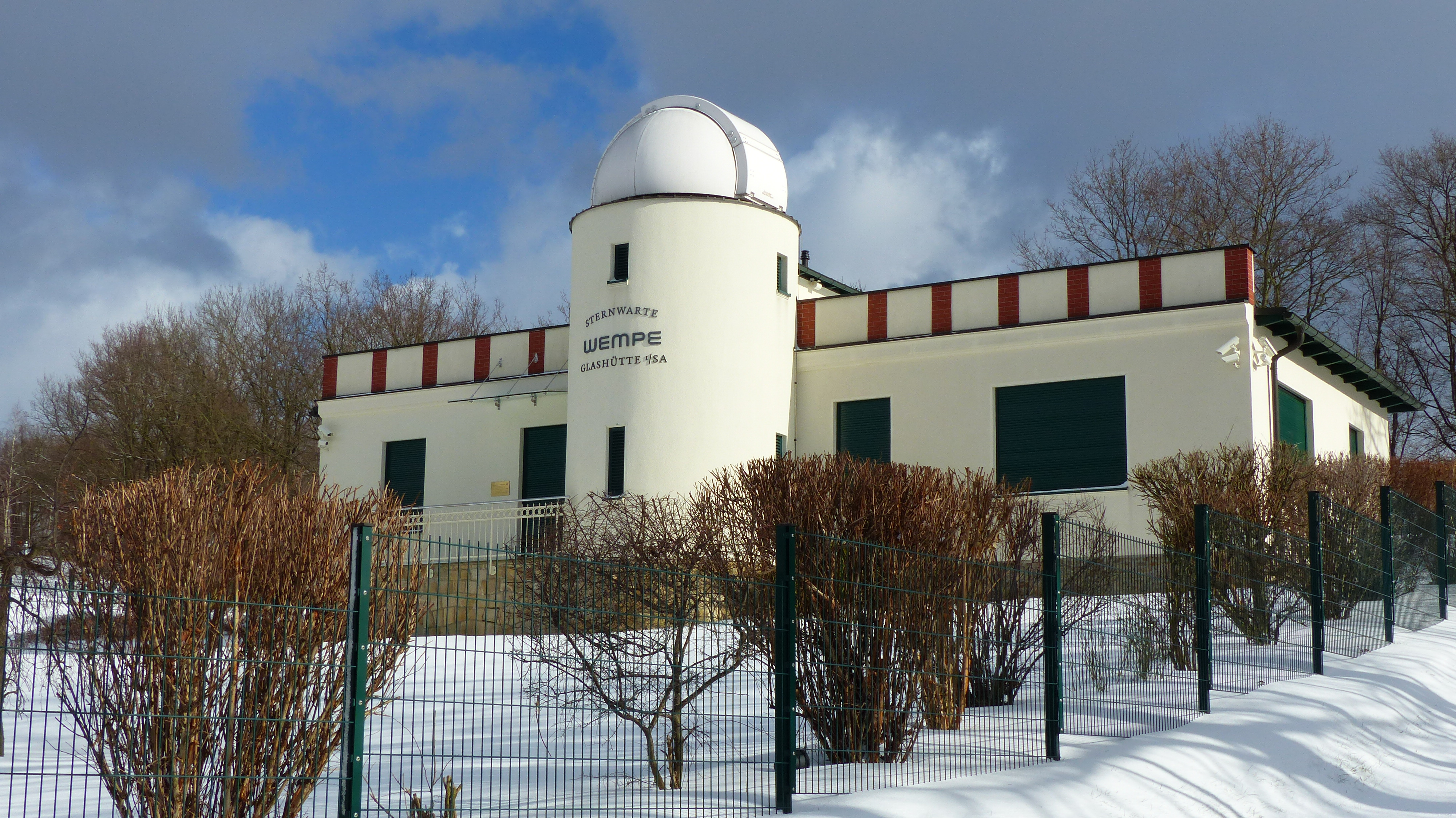 Sternwarte Glashütte, zugleich altes Produktionsgebäude von Wempe in Glashütte, Sachsen